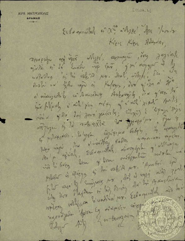 Писмо на Германос Сакеларидис